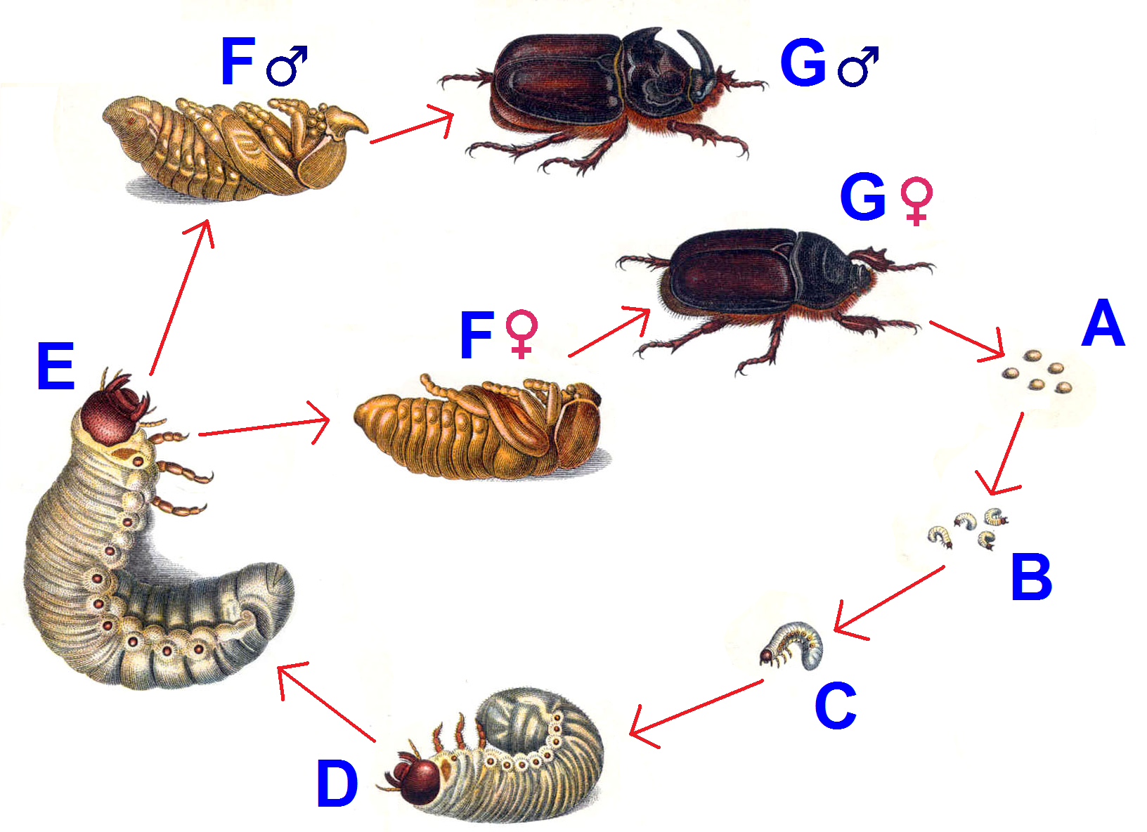 Fauna Germanica. Die Käfer des Deutschen Reiches. I. & II. Band. Farbendrucktafeln von Dr. K.G. Lutz. K.G. Lutz' Verlag, Stuttgart 1908